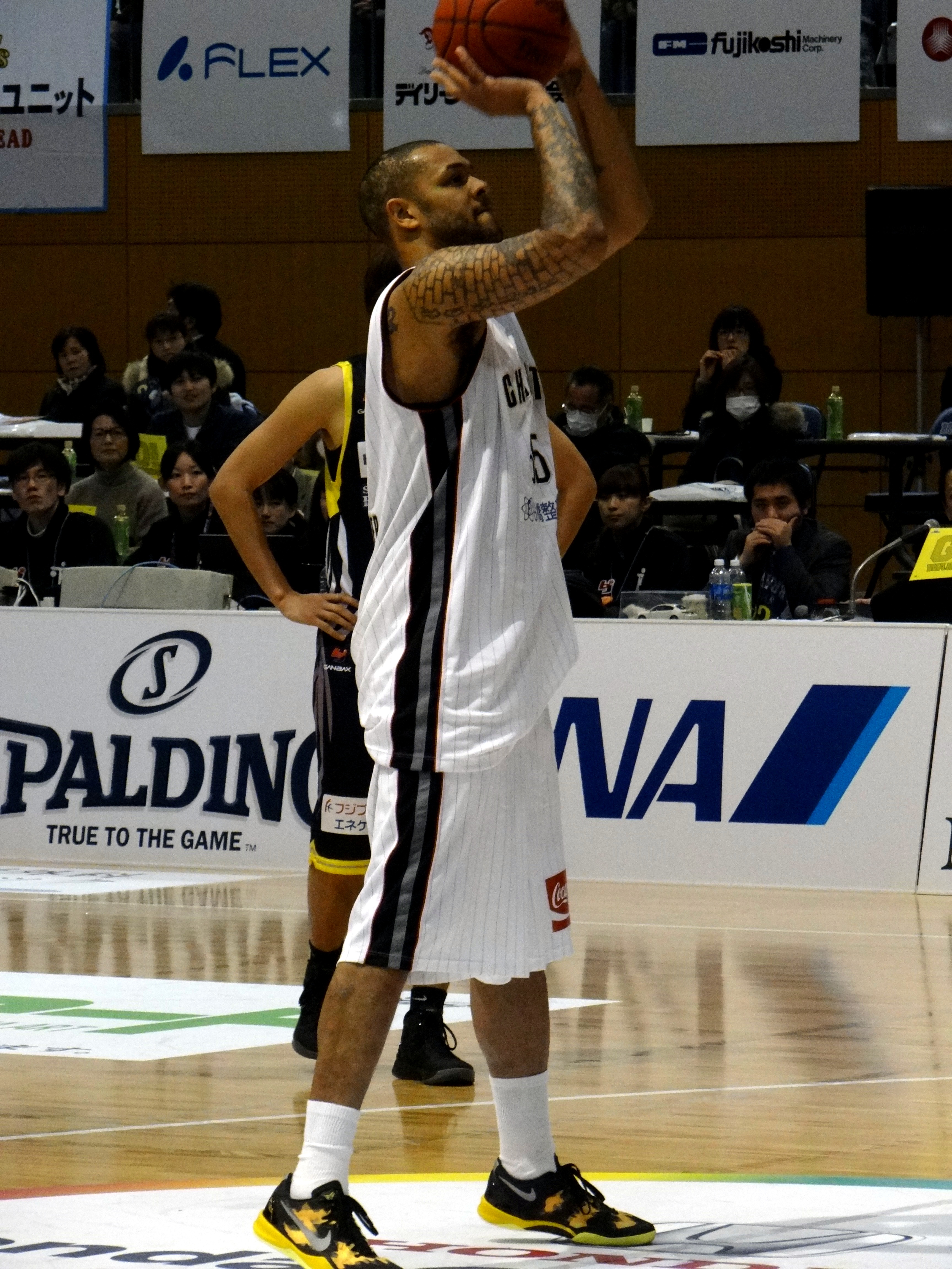 Nagano, Japan